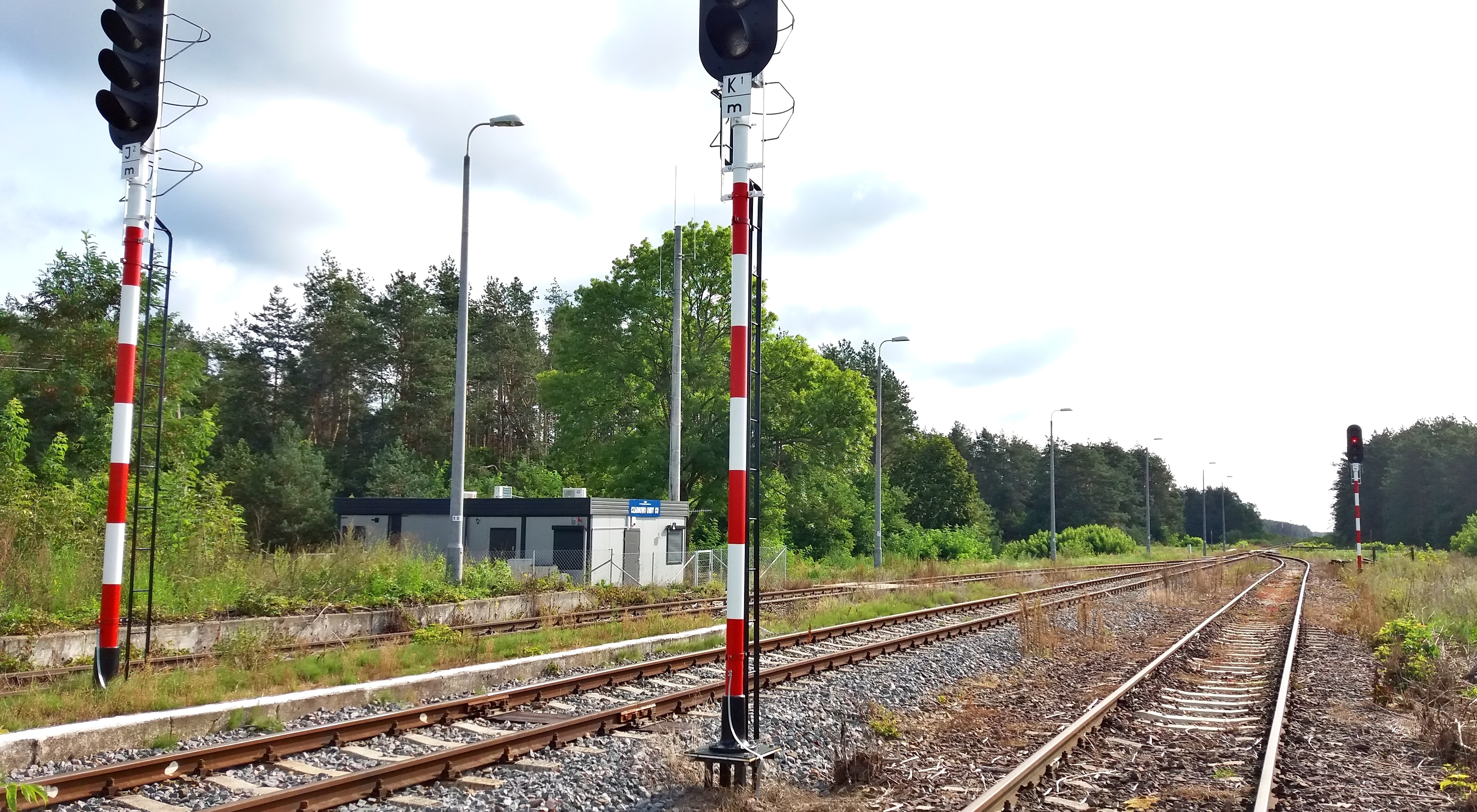 Przystanek kolejowy we wsi Czarnowo (2018). Na pierwszym planie - nastawnia kontenerowa